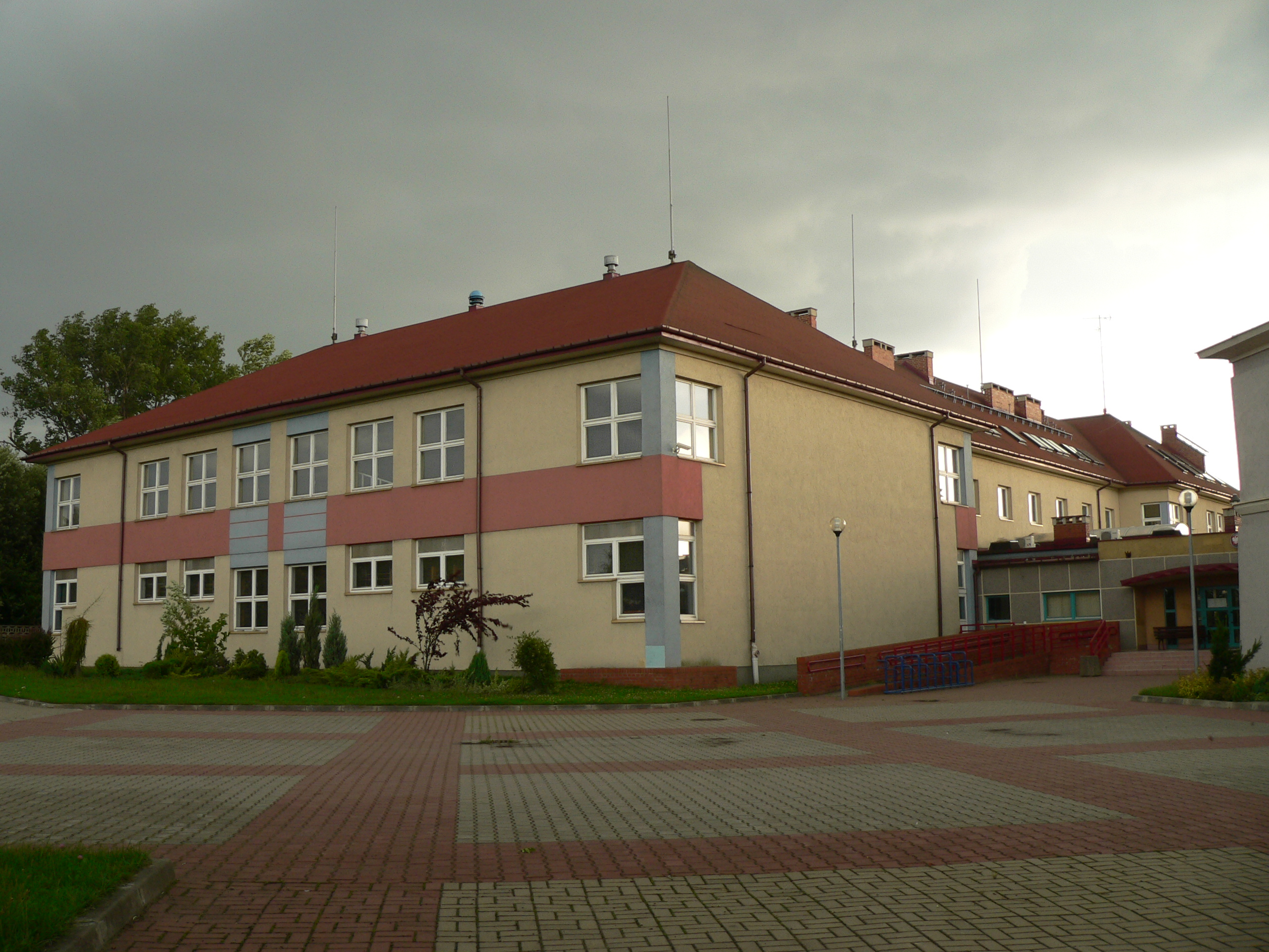 Jeden z zespołów szkół w Częstochowie obejmujacy SP nr 29 i Gimnazjum nr 14 im Królowej Jadwigi.jpg